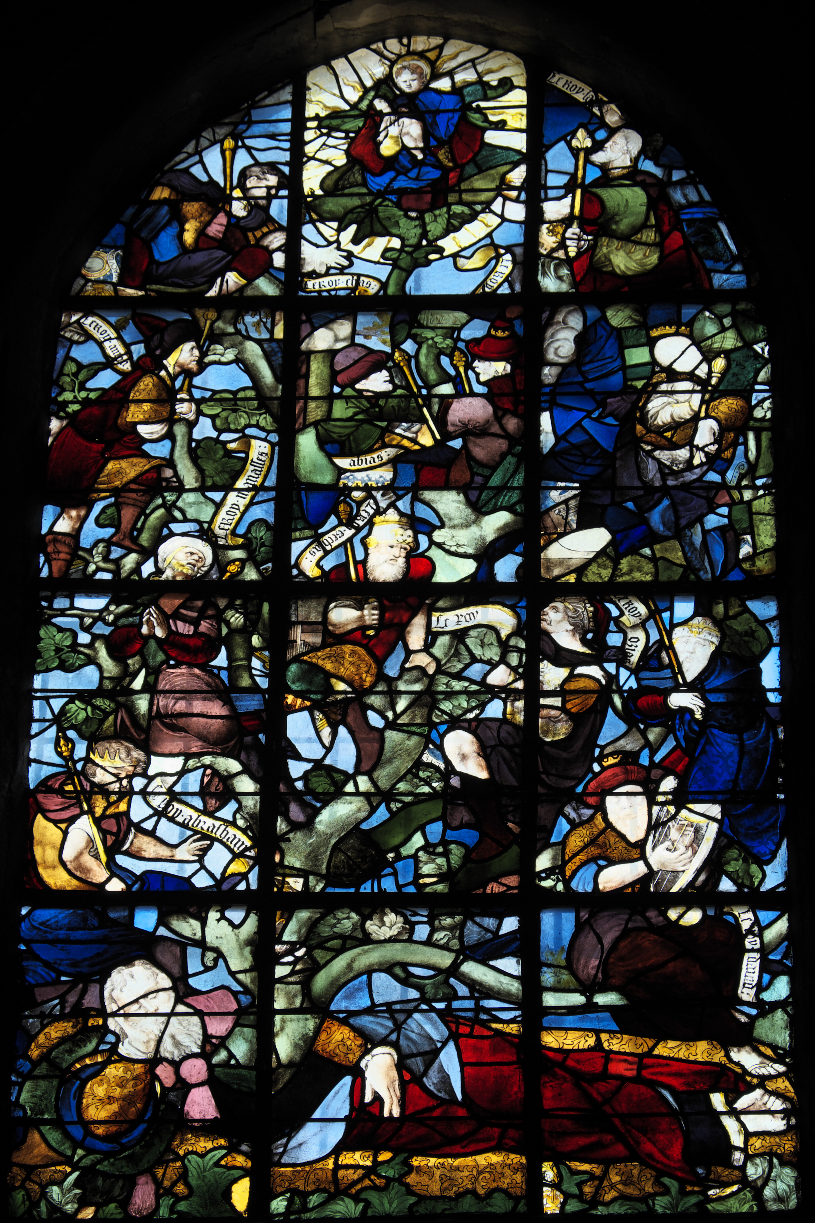 Katholische Pfarrkirche Saint-Leu-Saint-Gilles in Épinay-sur-Orge im Département Essonnes (Île-de-France/Frankreich), Bleiglasfenster aus dem 16. Jahrhundert; Darstellung: Wurzel Jesse